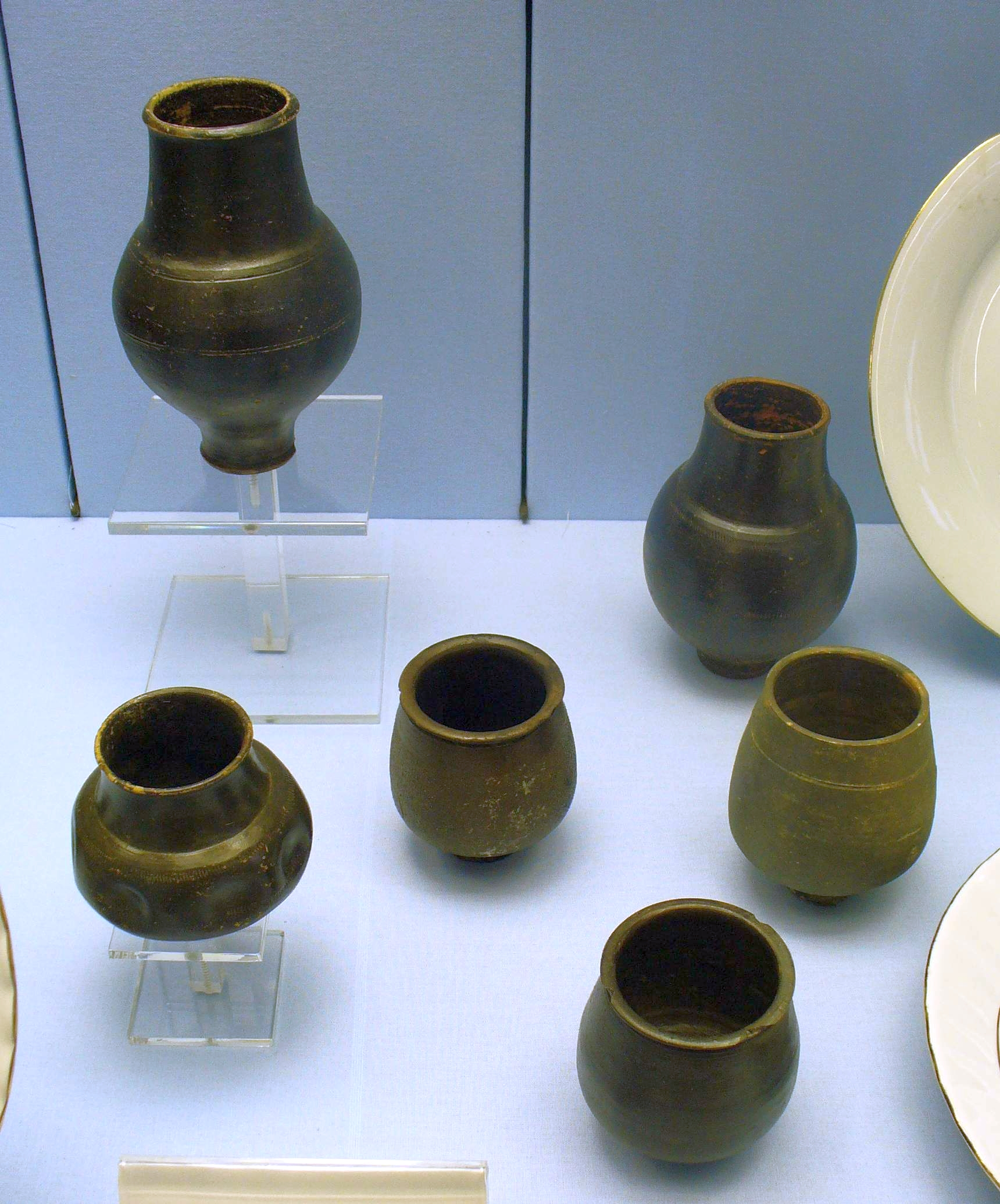 Römisch-kaiserzeitliche Terra nigra-Gefäße; 1.-5. Jahrhundert; Vor- und Frühgeschichtliche Sammlung im Wallenfels'schen Haus in Gießen